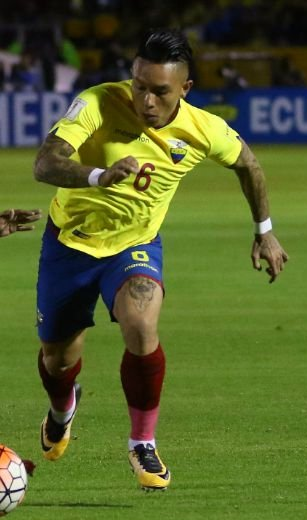 Quito, 10 oct (Andes).- Con tres tantos Argentina espantó los fantasmas de la eliminación, clasificó a su décima octava Copa del Mundo y venció 3-1 a un Ecuador que inició ganando el compromiso, disputado en el estadio Atahualpa de Quito, pero que no supo contener a uno de los mejores jugadores del mundo. ANDES/Micaela Ayala V.